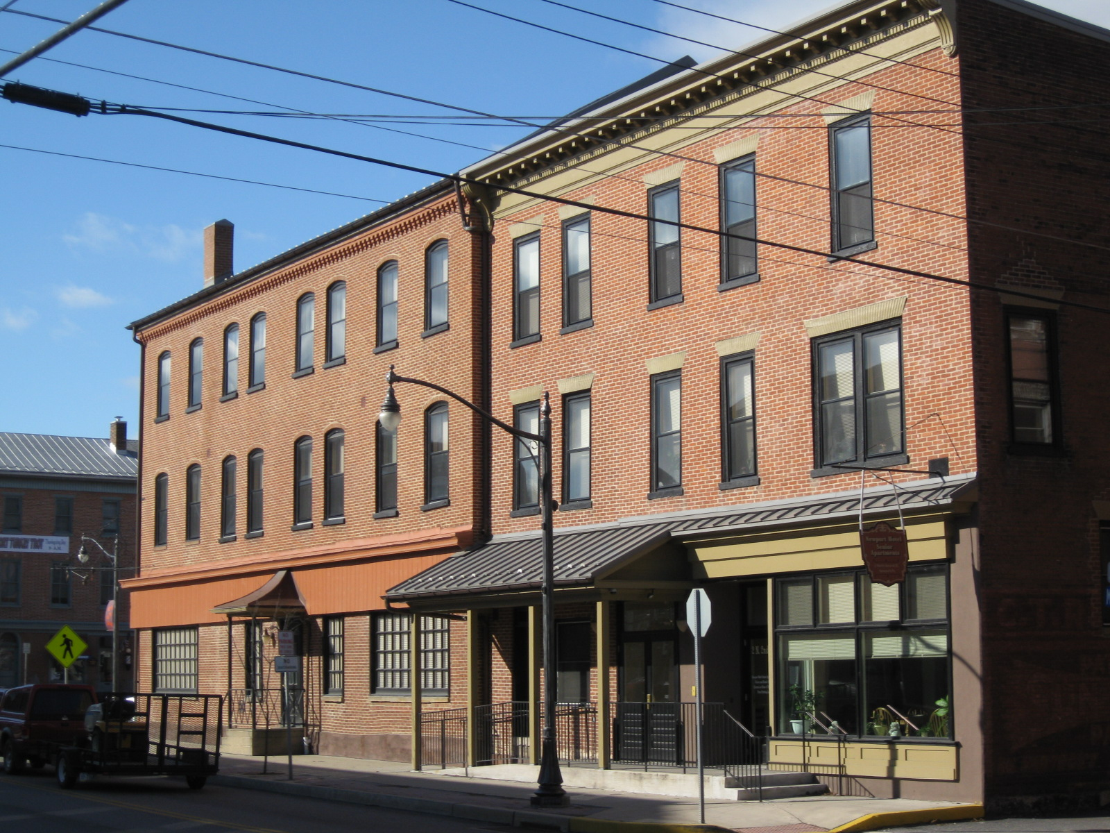 Newport, Pennsylvania